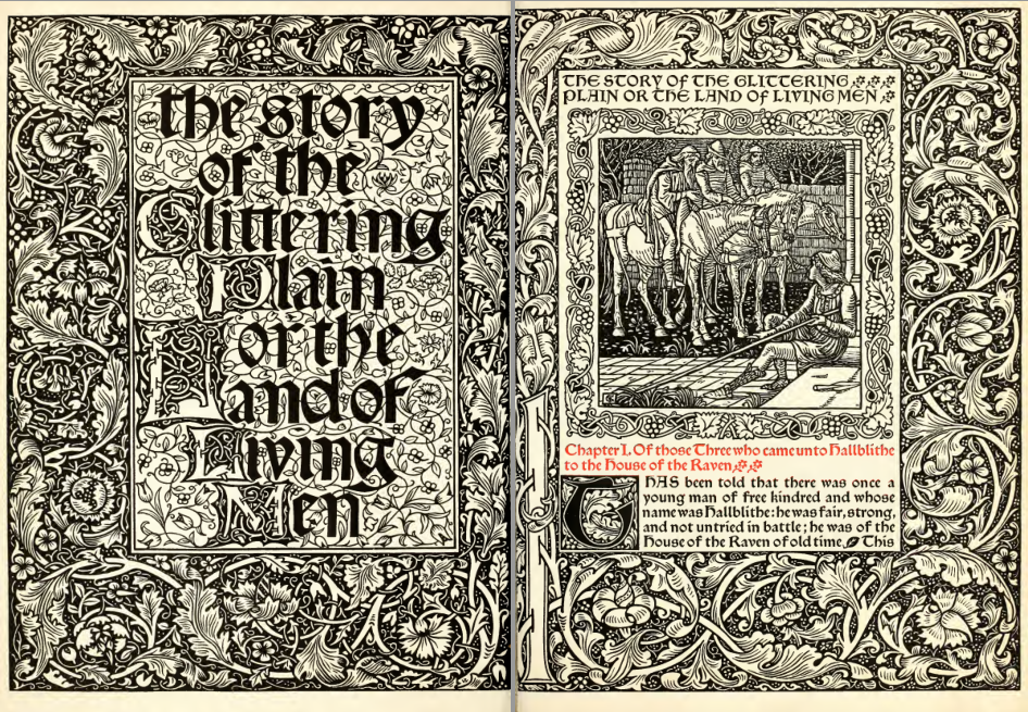 Premières pages du roman "The Story of the Glittering Plain" ("L'Histoire de la Plaine étincelante") de William Morris, dans sa seconde édition de 1894 enrichie d'illustrations de Walter Crane, le tout publié par Kelmscott Press, la maison d'édition fondée par William Morris.